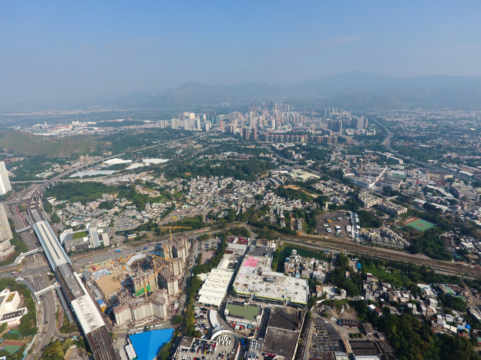 Ping Shan Overview